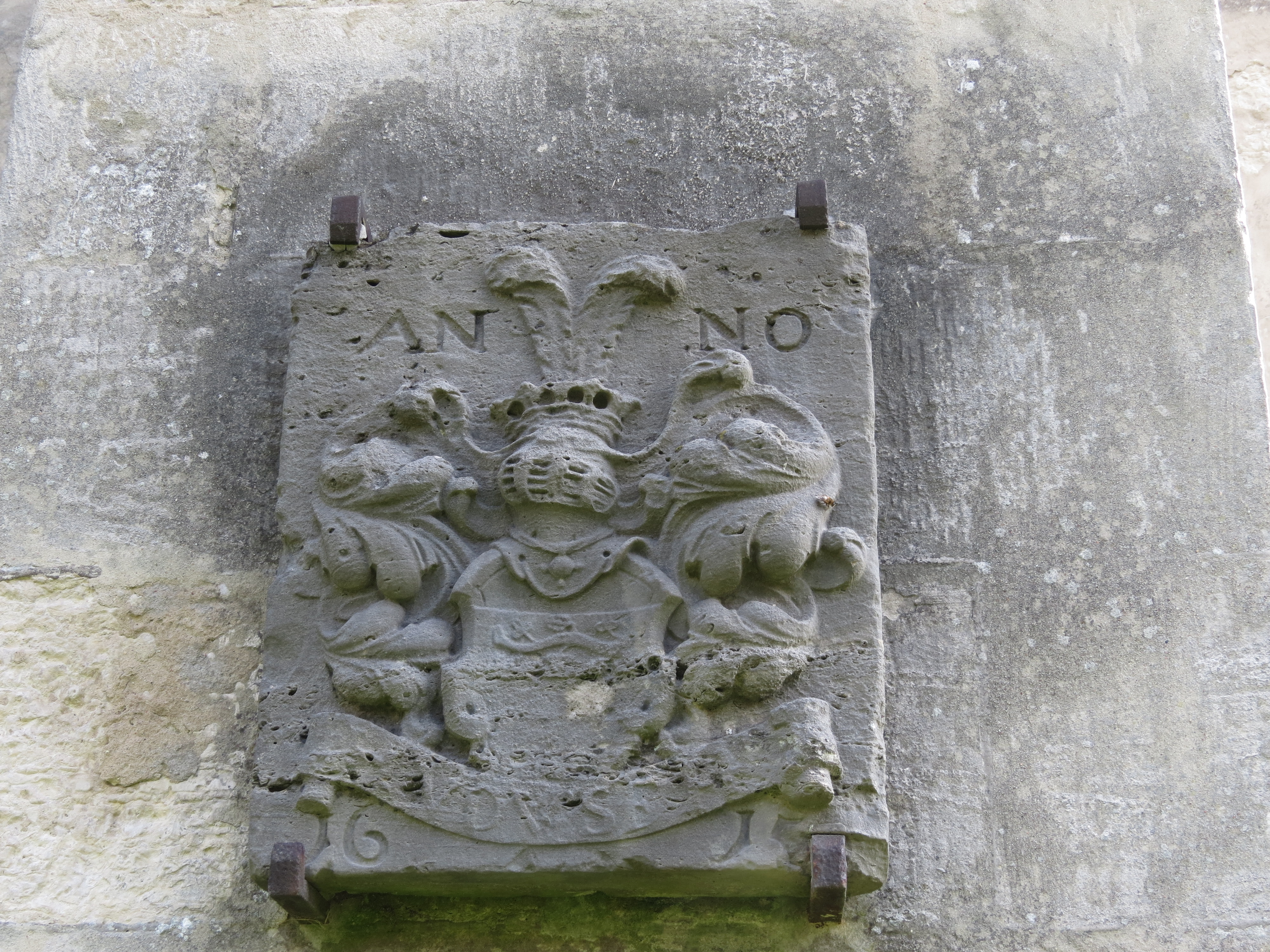 Wappen des Komturs Philipp Friedrich von Weidensee an der Kirche der früheren Templer- dann Johanniterkommende in Süpplingenburg, Landkreis Helmstedt, Niedersachsen. an der Westmauer der Kirche, stammt ursprünglich von einem Burgtor, das der Komtur errichten ließ.